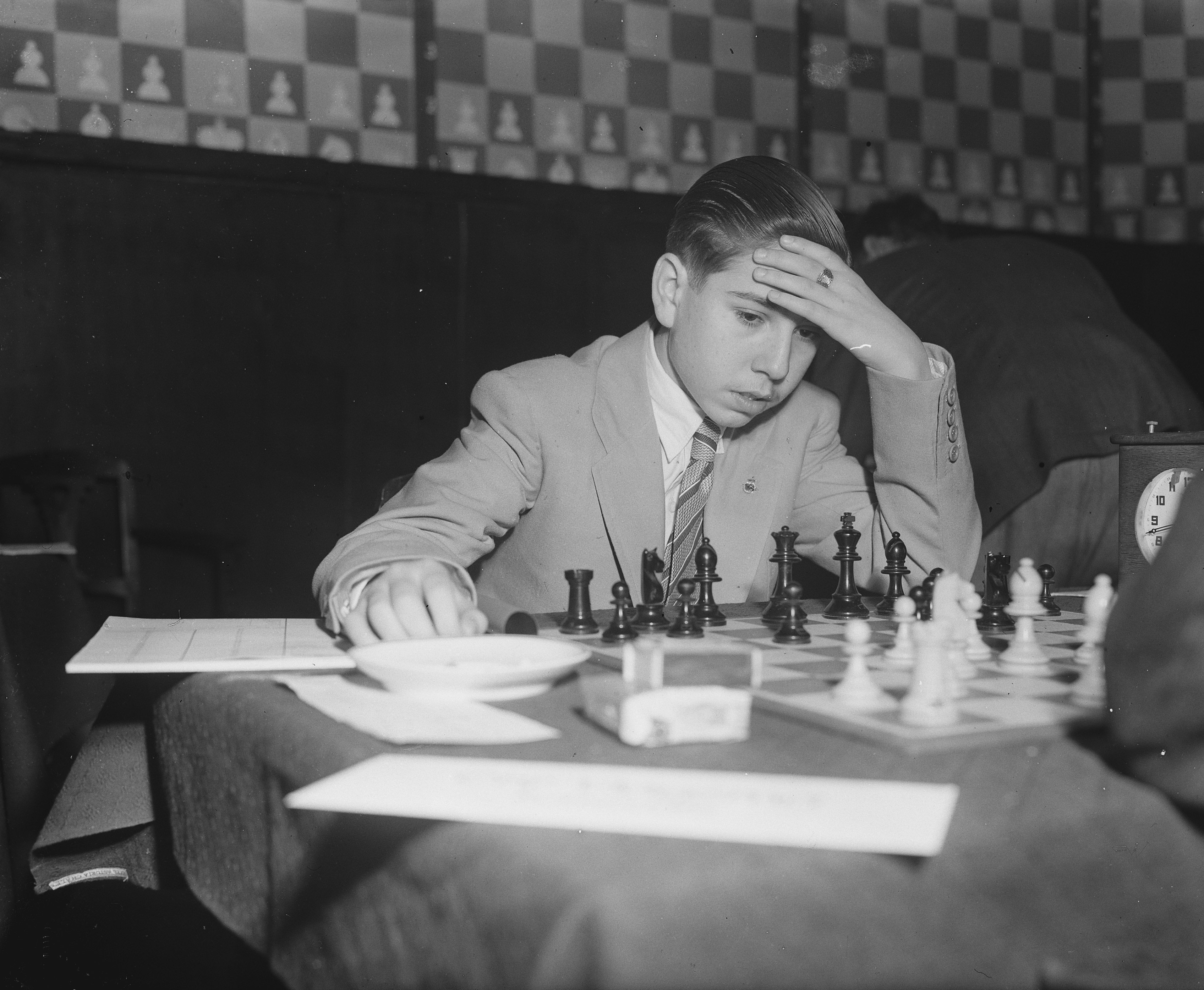 Collectie / Archief : Fotocollectie Anefo Reportage / Serie : [ onbekend ] Beschrijving : Schaaktoernooi Baarn Datum : 9 mei 1947 Locatie : Baarn Trefwoorden : SCHAAKTOURNOOI Fotograaf : Wisman, Bram / Anefo Auteursrechthebbende : Nationaal Archief Materiaalsoort : Glasnegatief Nummer archiefinventaris : bekijk toegang 2.24.01.09 Bestanddeelnummer : 902-1556